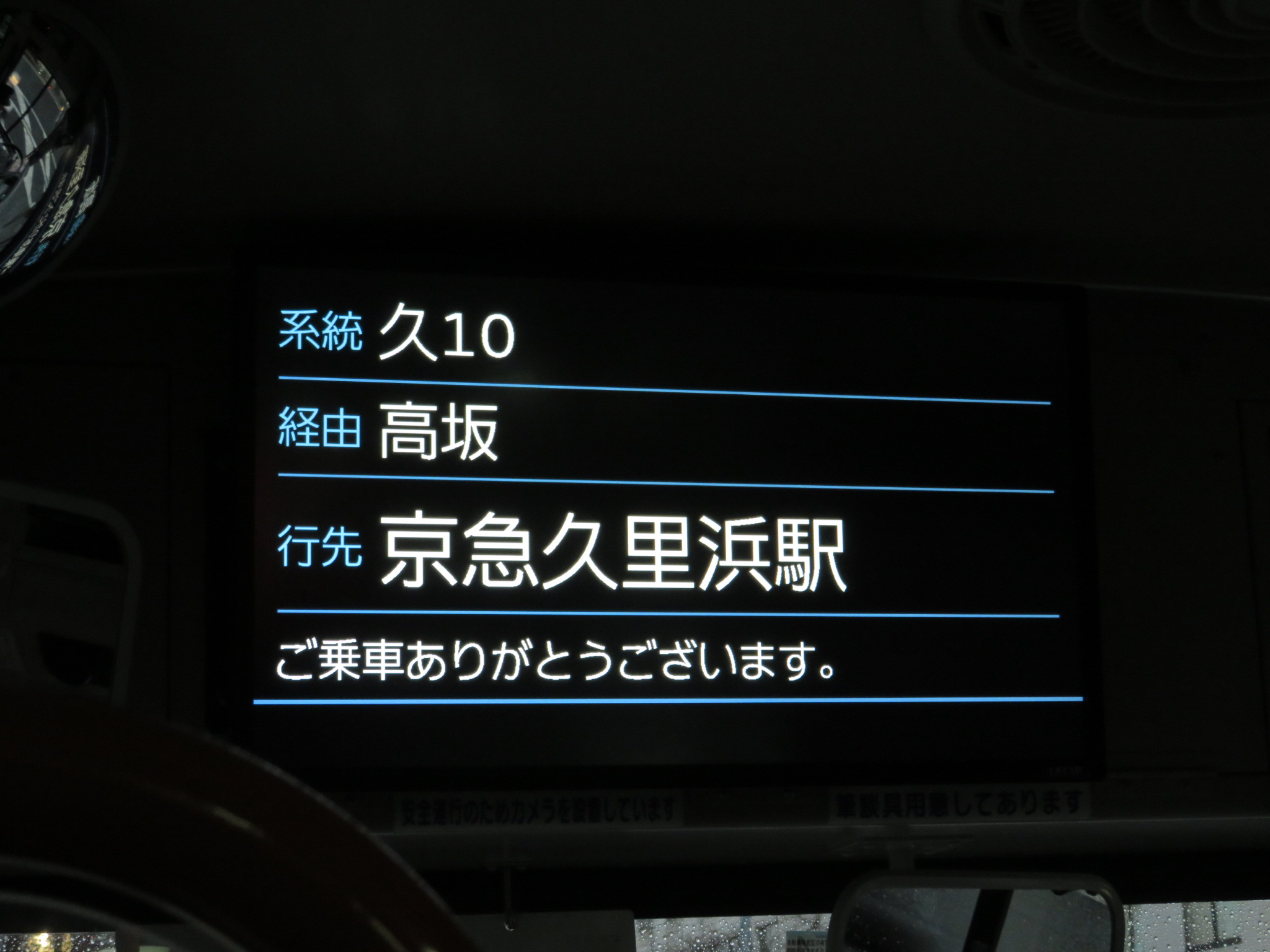 京急バス久里浜営業所の始発案内です。